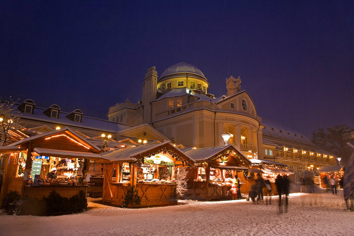 Blick auf das Kurhaus und die Verkaufsstände des Meraner Christkindlmarkts in Meran /Südtirol